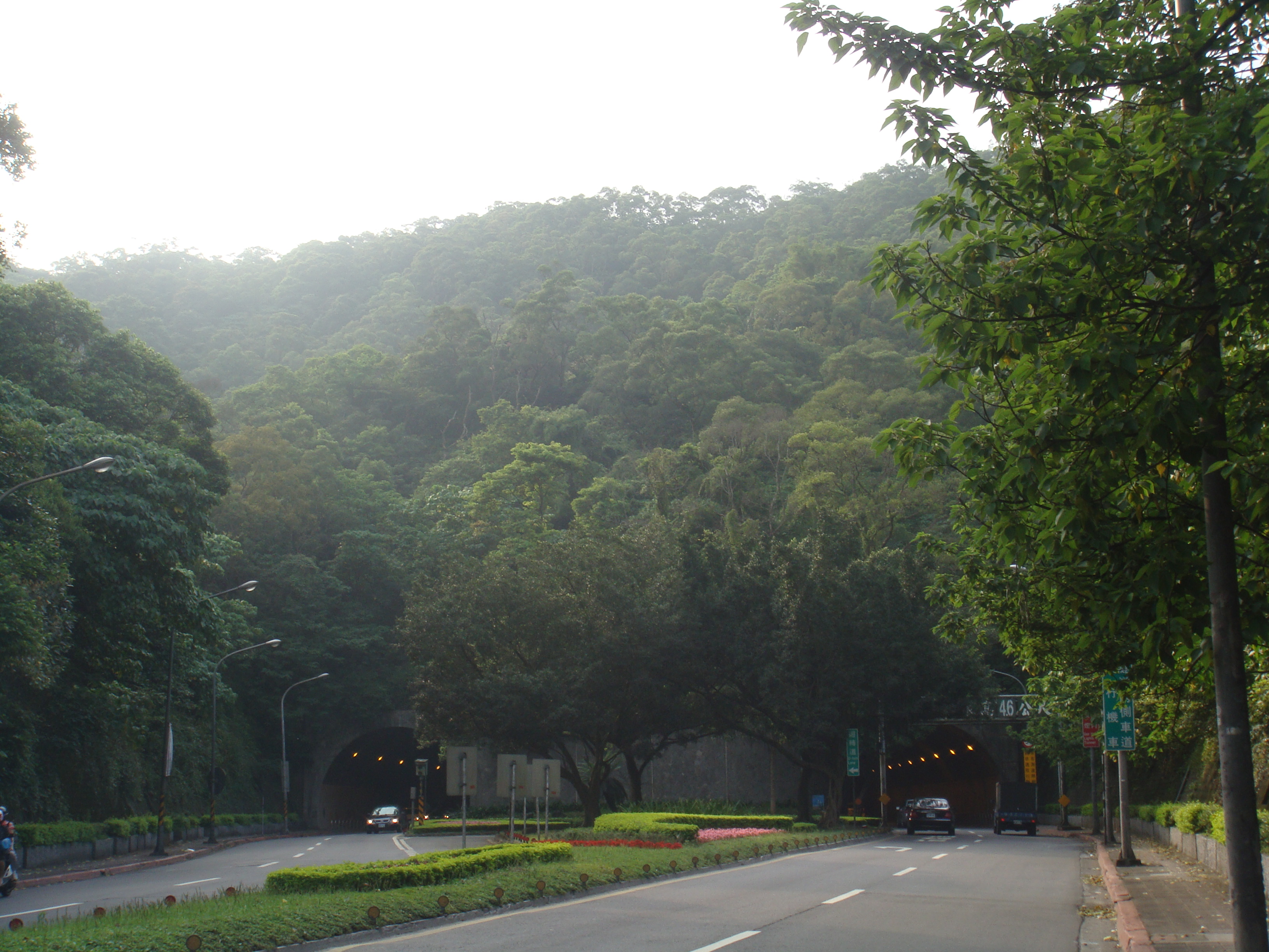 辛亥隧道東端（辛亥路四段）出口。